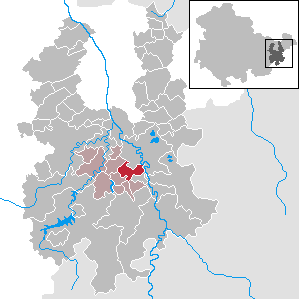 Wildetaube in Thuringia - District Greiz